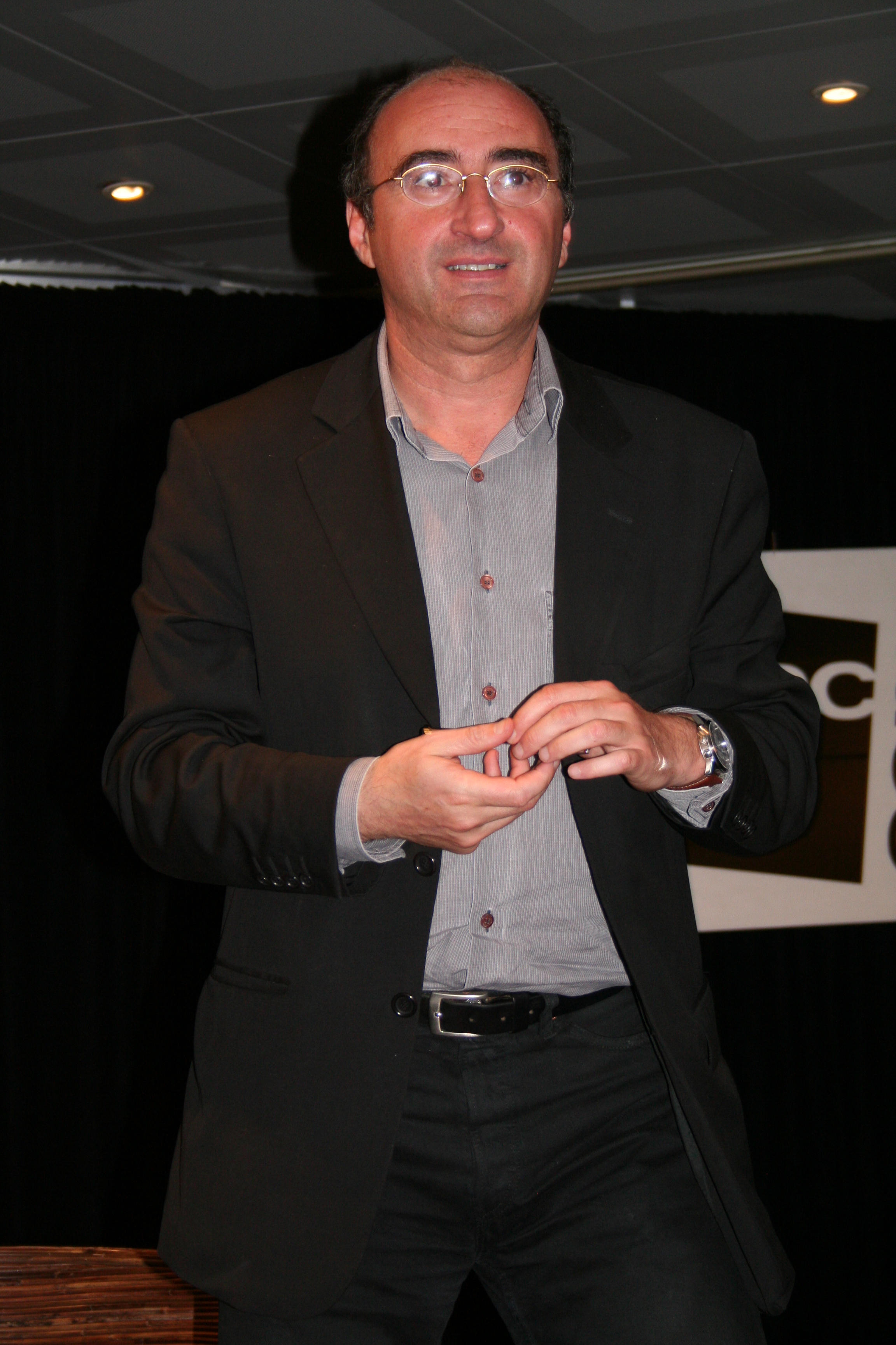 Rencontre avec Éric Halphen pour Le bal des outrés, en présence de Dominique Barella. Fnac des Ternes (Paris, France)